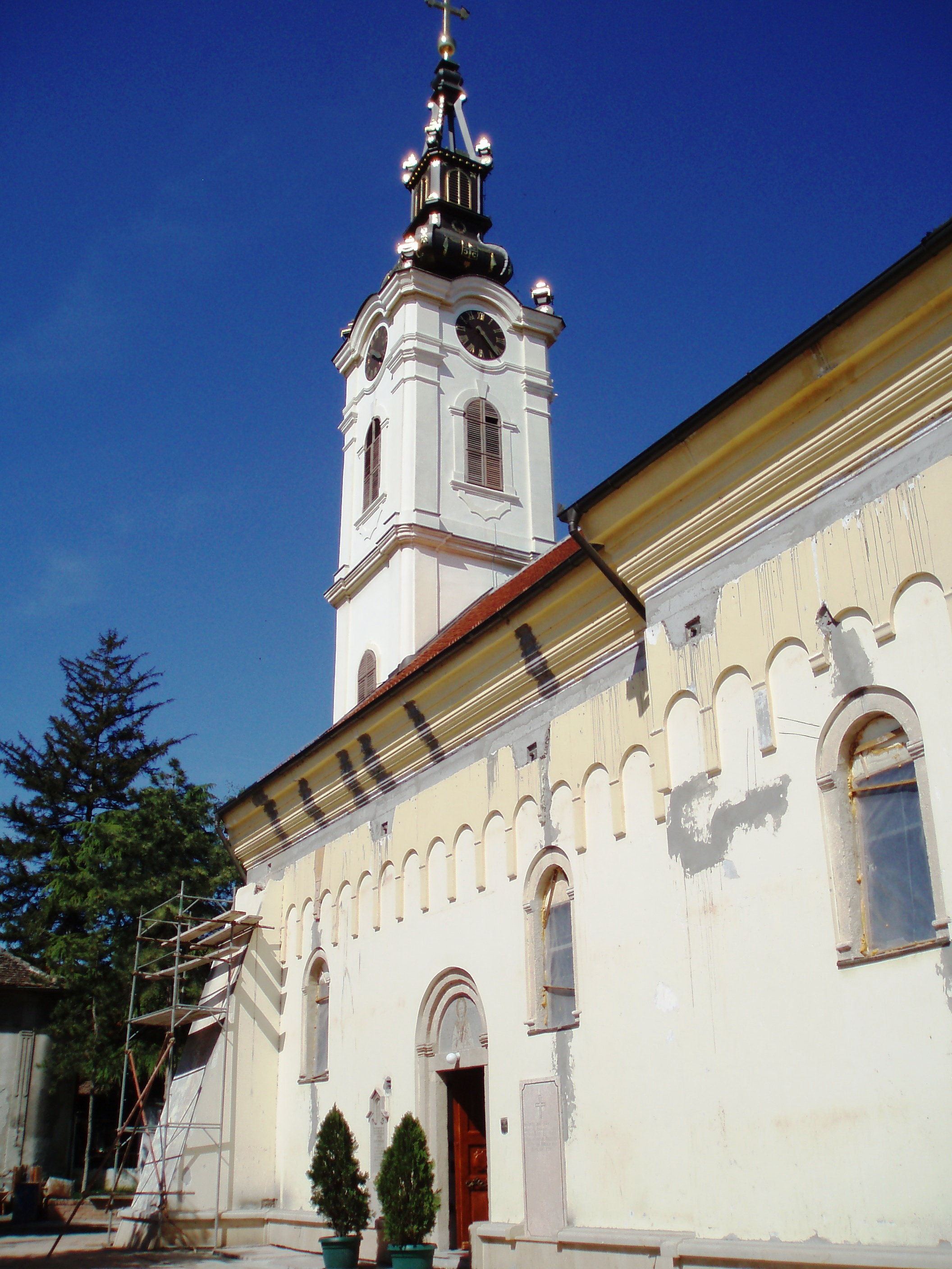 Фотографија Николајевске цркве у Земуну, аутор фотографије: Nicolo